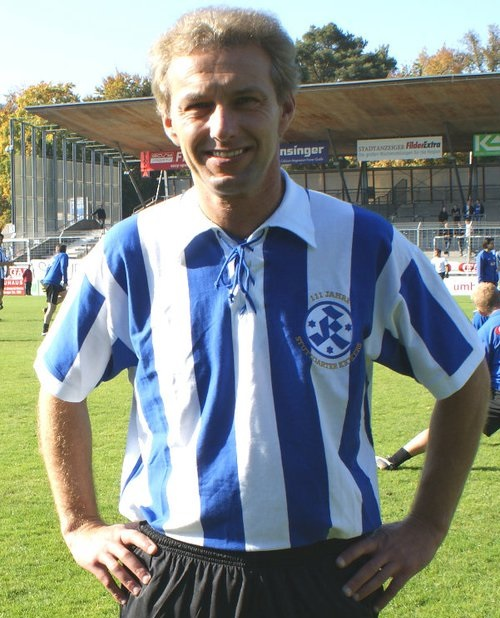 Bernd Schindler 2011 beim Jubiläumsspiel der Stuttgarter Kickers